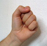 Chinesische Zahl Zehn